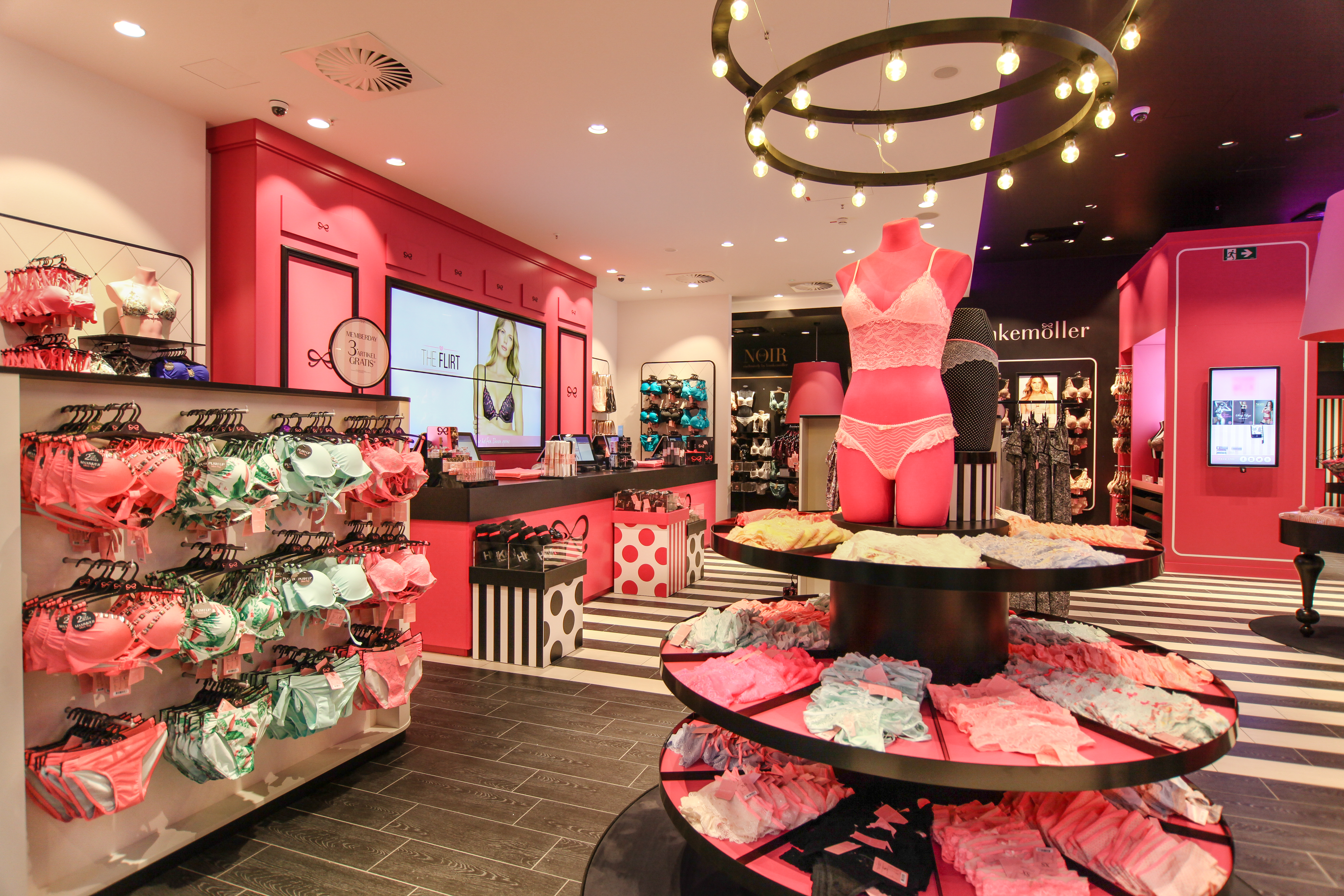 Verkaufsraum Innenansicht